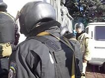 21/02/14 21 лютого 2014 року під час засідання Верховної Ради України група осіб озброєних автоматичною зброєю та з набоями, одягнених у форму офіцерів силових відомств України, але з знятими знаками розрізнення (всього близько 50 осіб), проникли в кулуари Верховної Ради України без відповідних дозвільних документів для проходження у приміщення Верховної Ради України. Працівники ДСО що стояли на посту, не перешкоджали їхньому проникненню в кулуари Верховної Ради України, що зафіксовано на відео, яке було оприлюднене у засобах масової інформації. Спротив можливому захопленню приміщення Верховної Ради України і можливого військового перевороту вчинилижурналісти, народні депутати та інші присутні у кулуарах Верховної Ради України. Подальші проблеми відвернули увагу від цієї події, але з урахуванням усіх наступних подій здається, що є причинно-наслідковий зв’язок між цими діями офіцерів силових відомств без знаків розрізнення що мали автоматичну зброю і подальшими подіями в Україні, що призвели до втрати територіальної цілісності та ескалації воєнних дій.